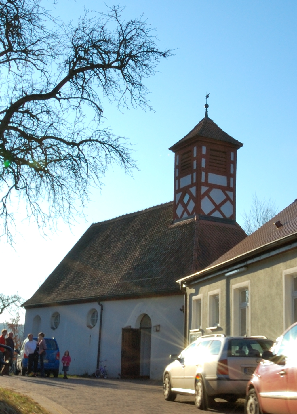 Vestenberg, ehemalige Burgkapelle, heute als Gemeindehaus genutzt